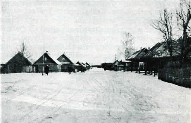 Деревня Ванакюля в Эстонской Ингерманландии.